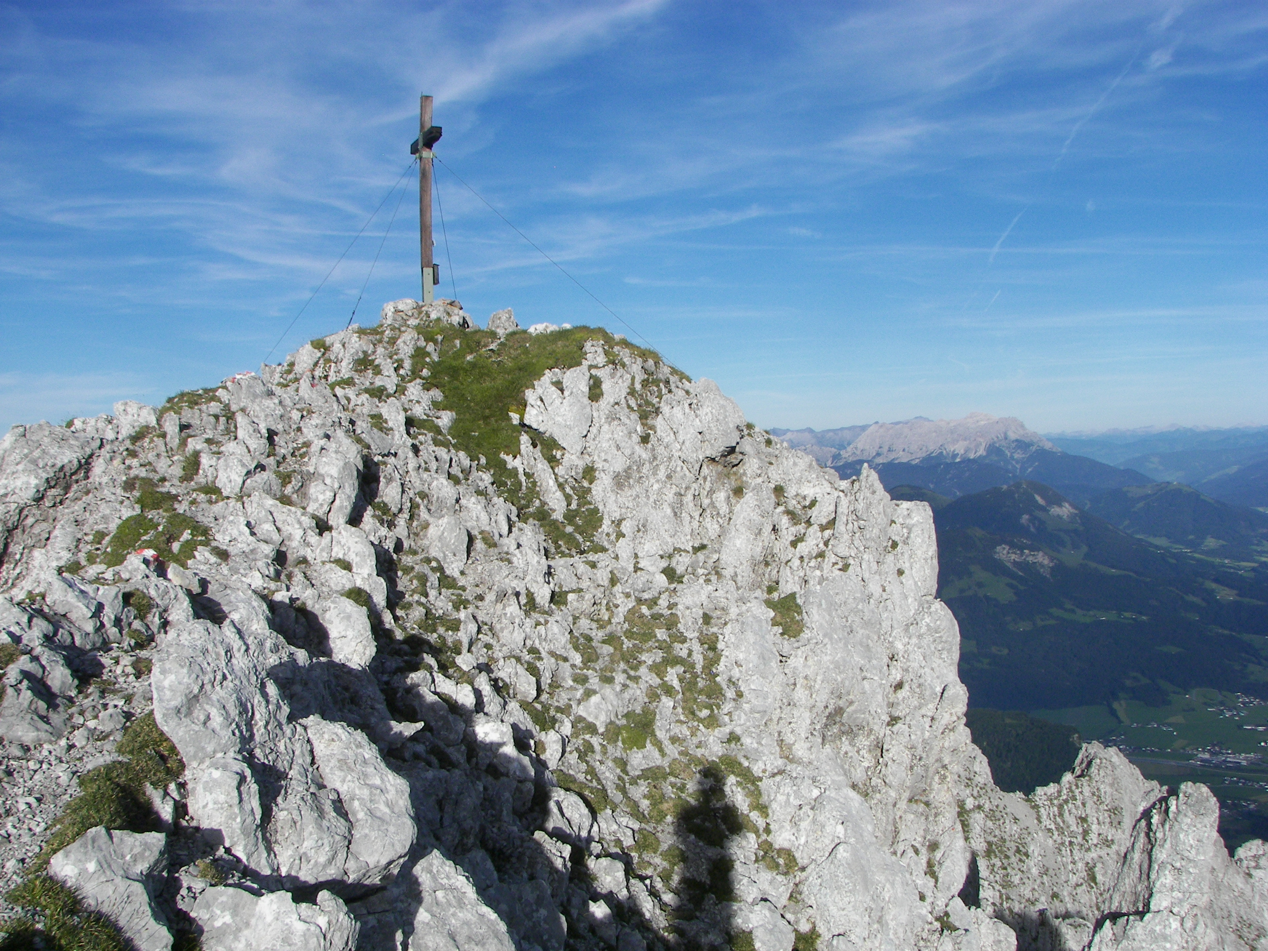 Gipfel der Maukspitze (Wilder Kaiser)